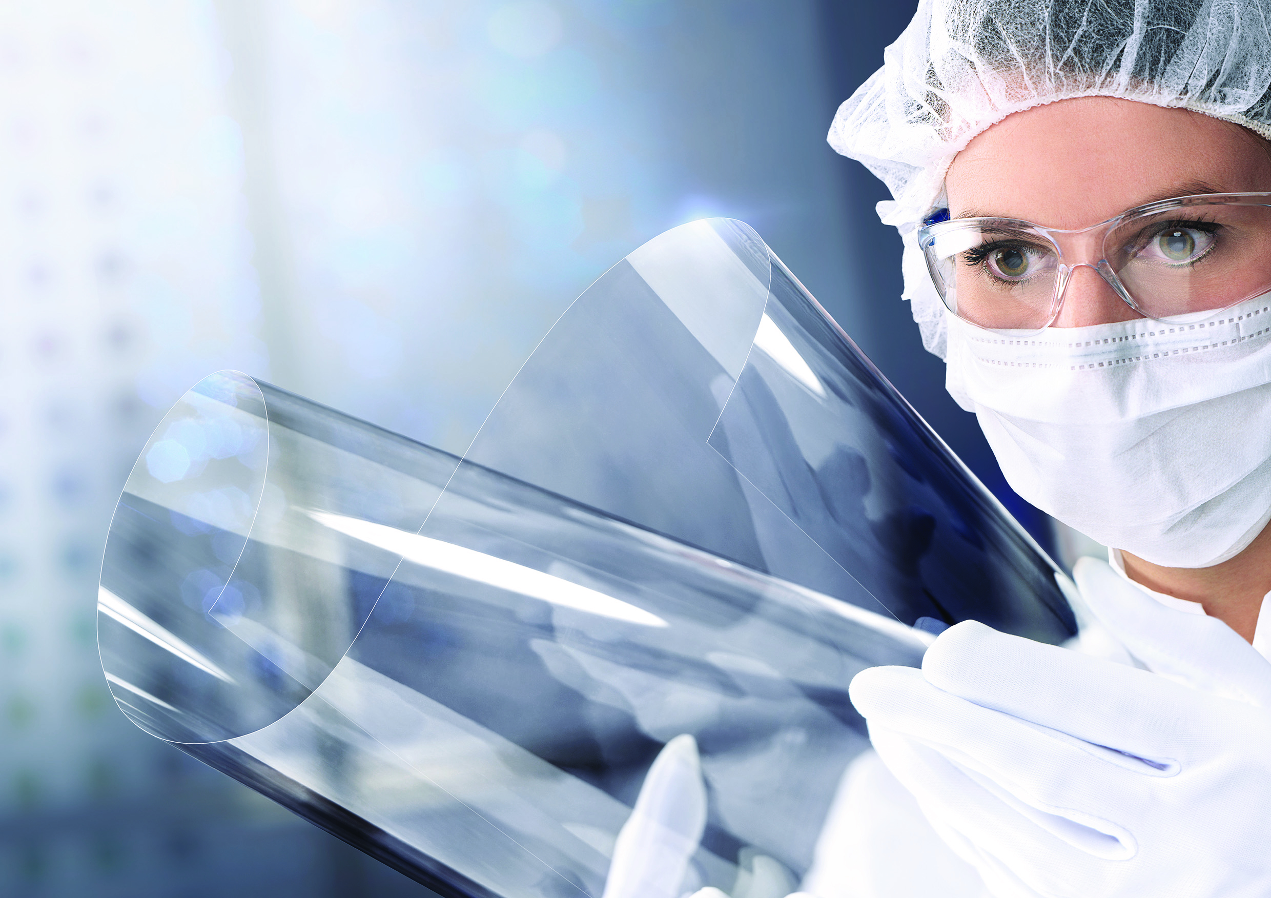 Motiv gebogenes Glas